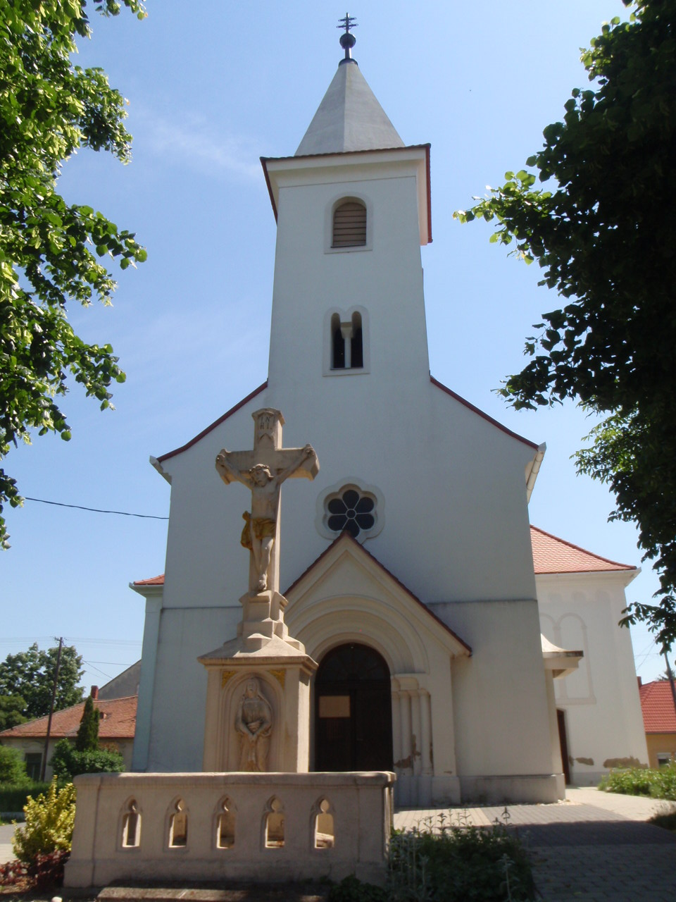 Szent Márk templom Rábasömjén